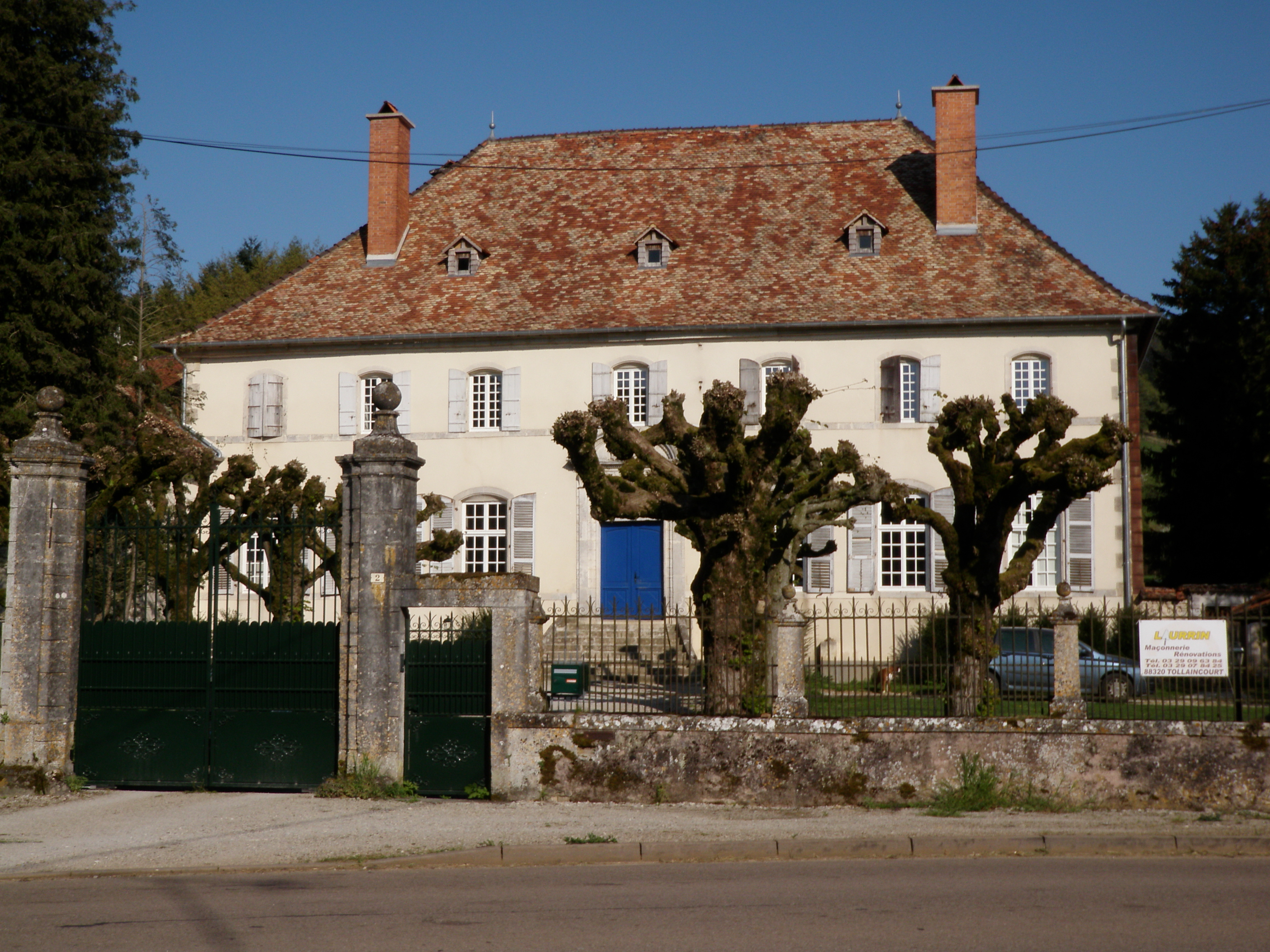 Façade principale